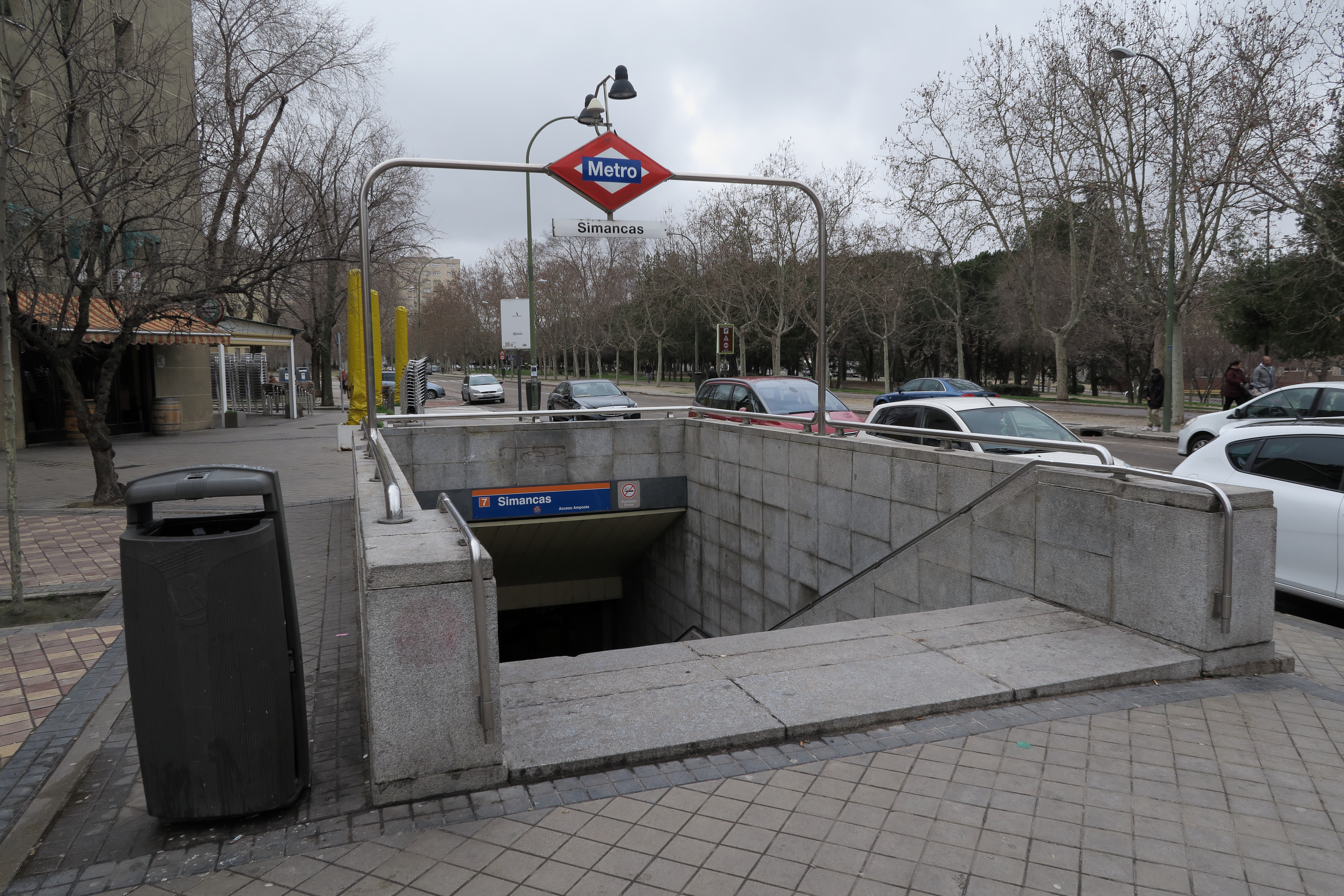 Estación de Simancas